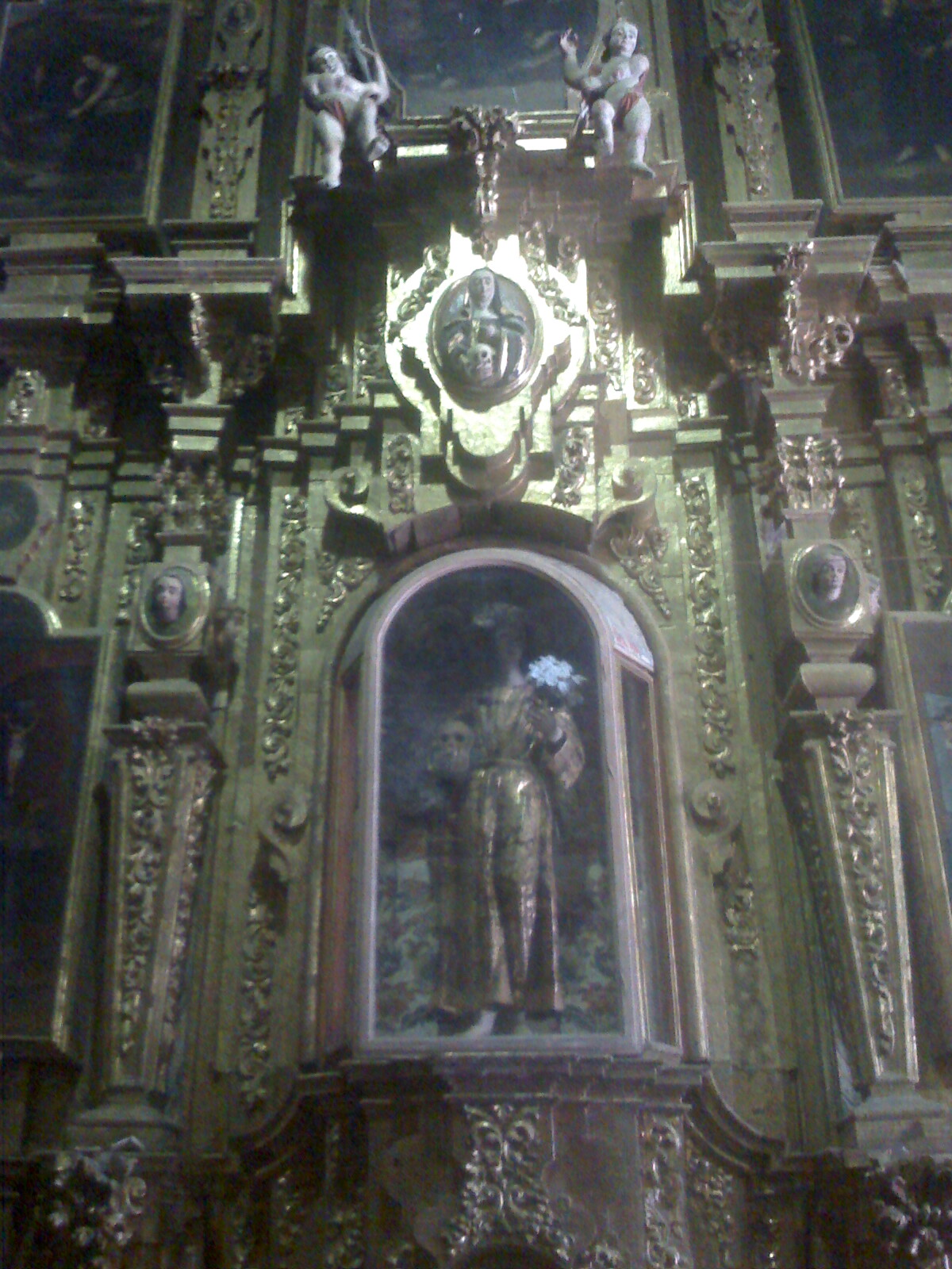 Retablo Iglesia Santuario Hidalgo